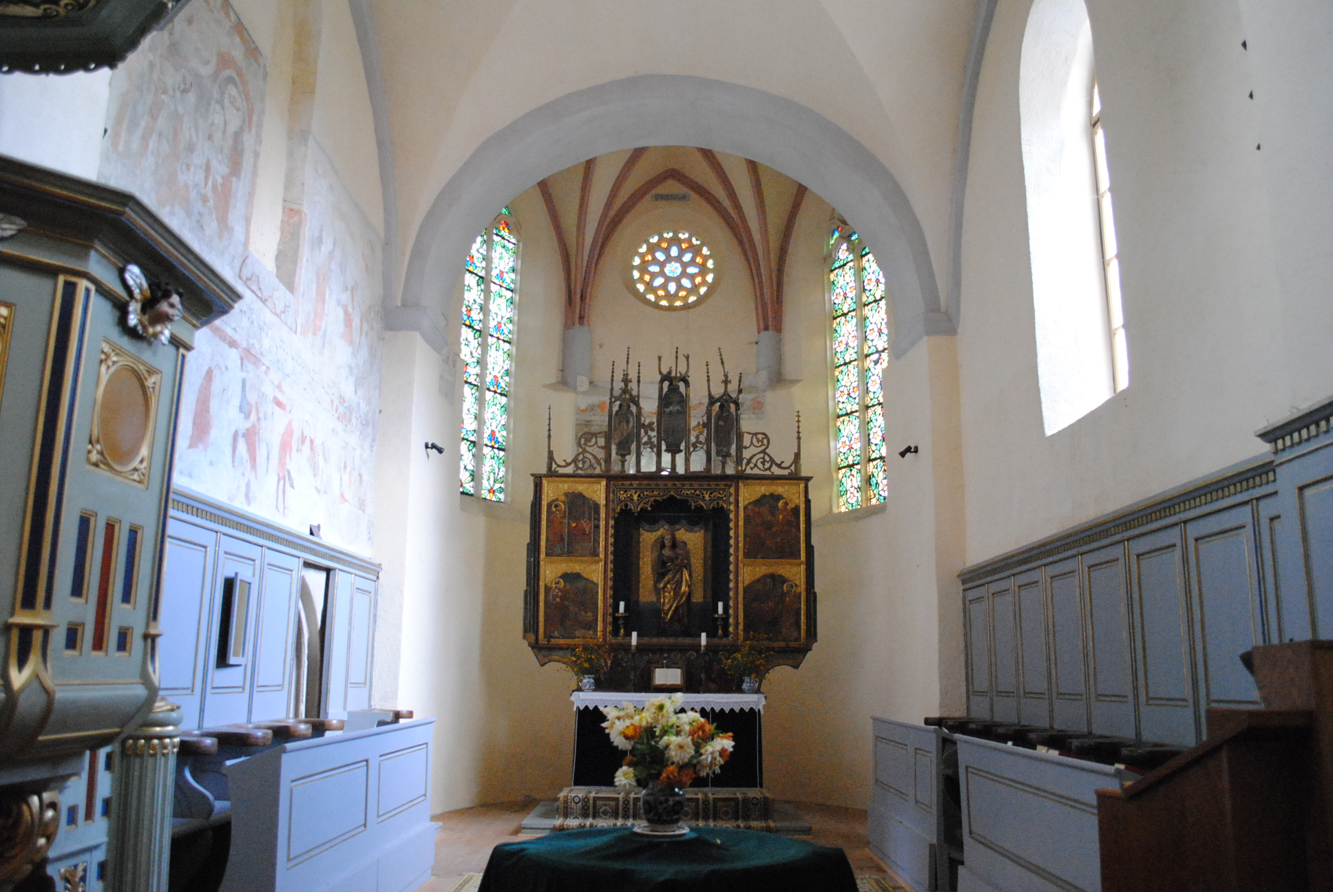 Ansamblul bisericii evanghelice fortificate, sec. XIII - XVIII